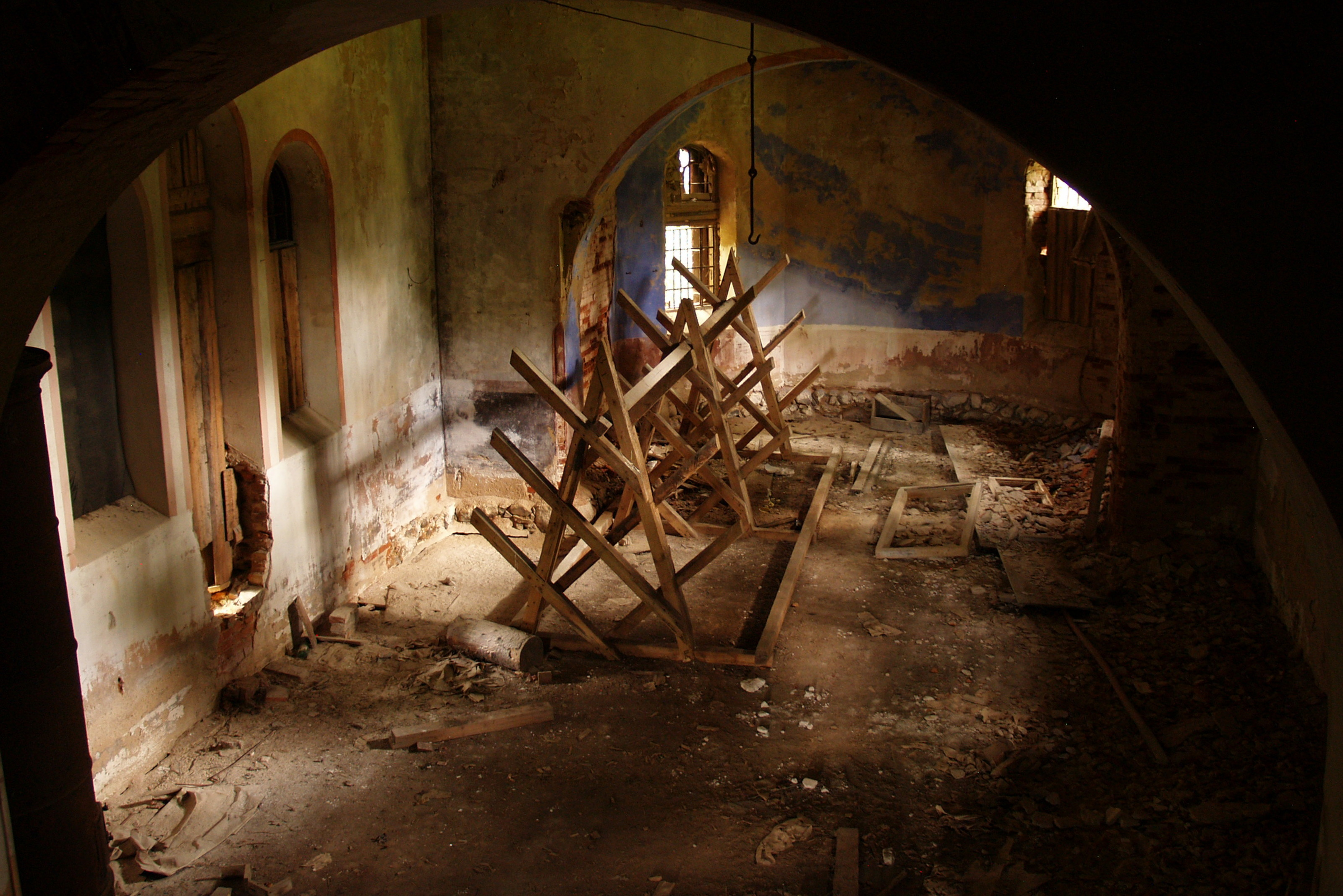 Suislepa Püha Katariina kirik